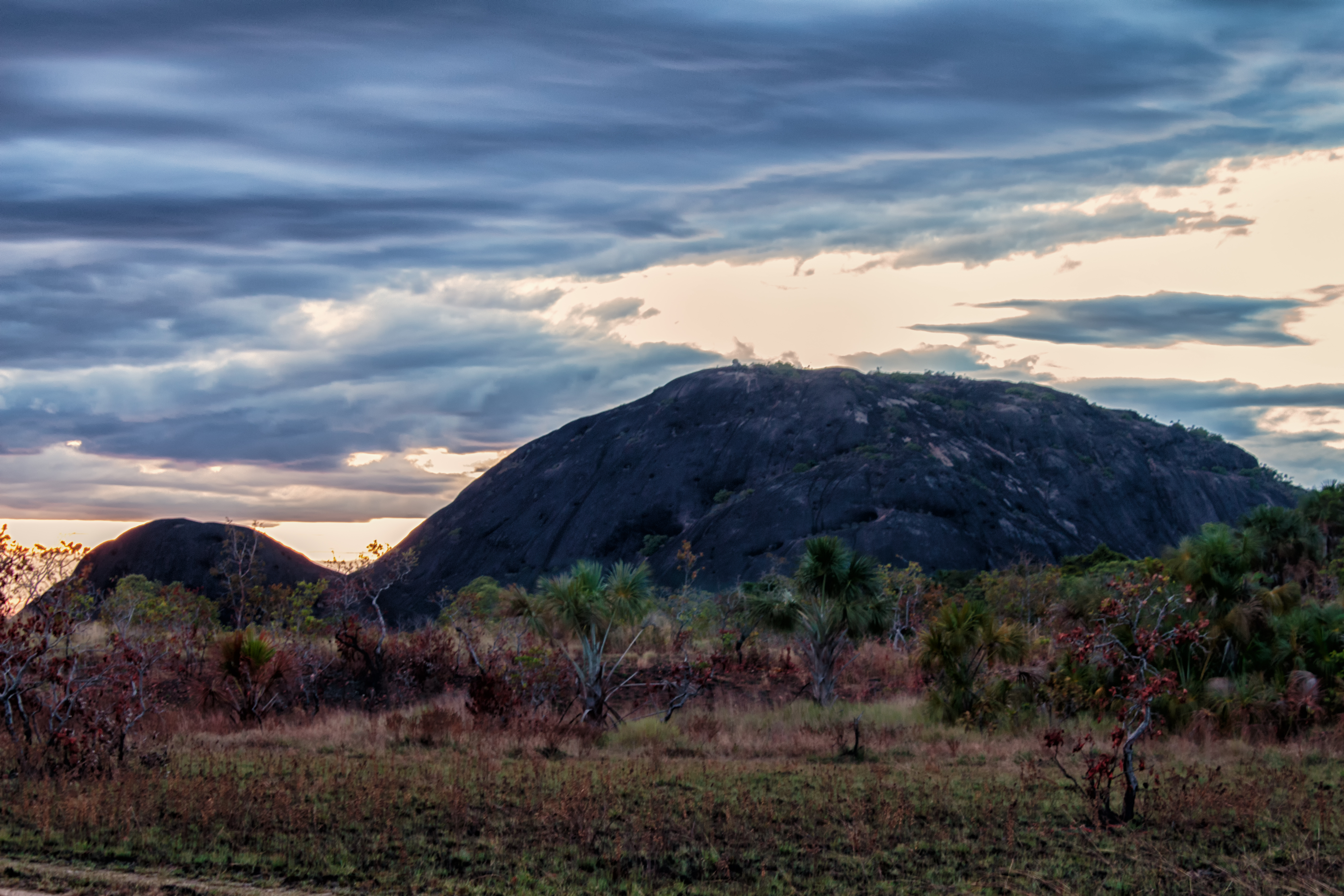 Monumento Natural Piedra de la Tortuga